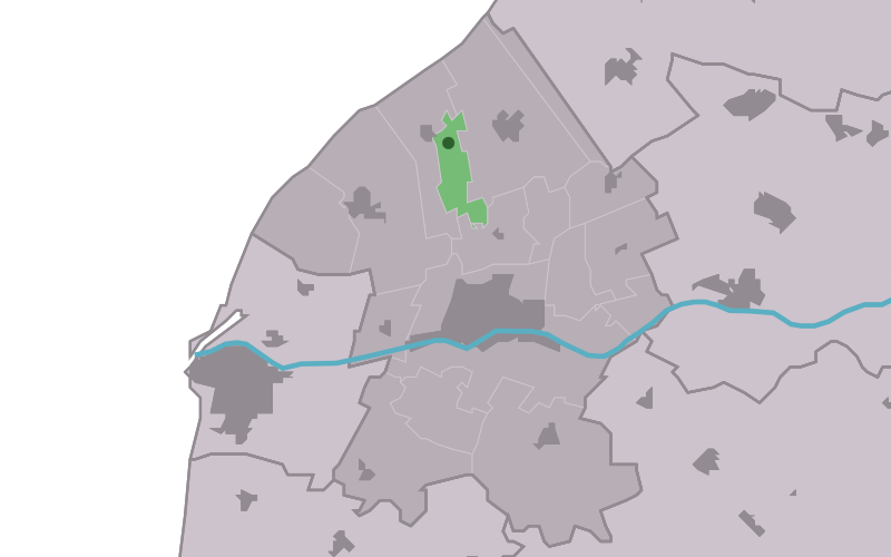 Kaartsje fan himrik fan Kleaster Lidlum